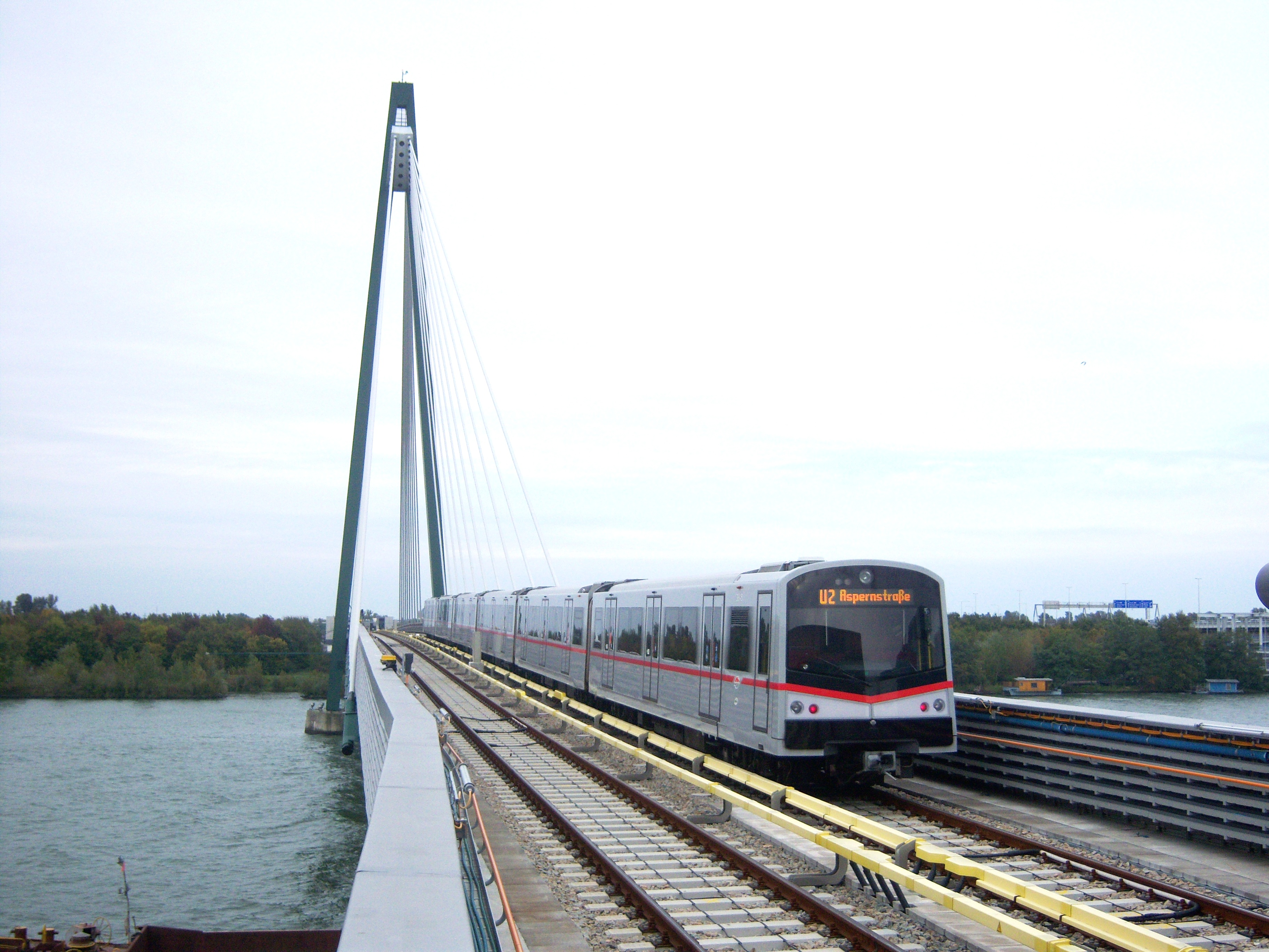 Zug der Linie U2 überquert auf der Donaustadtbrücke die Donau